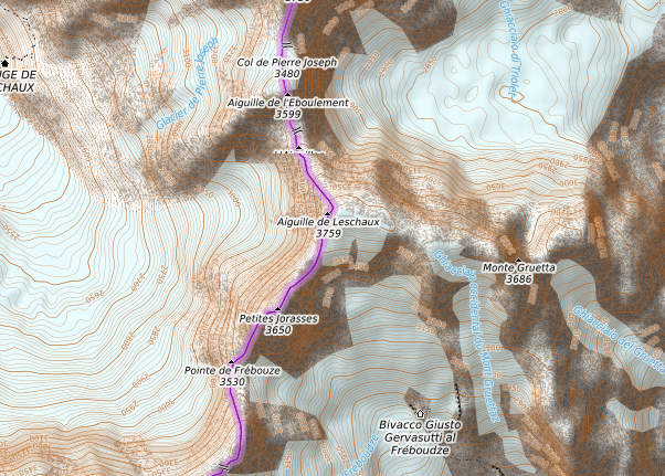 carte réalisée sur umap This map may be incomplete, and may contain errors. Don't rely solely on it for navigation.